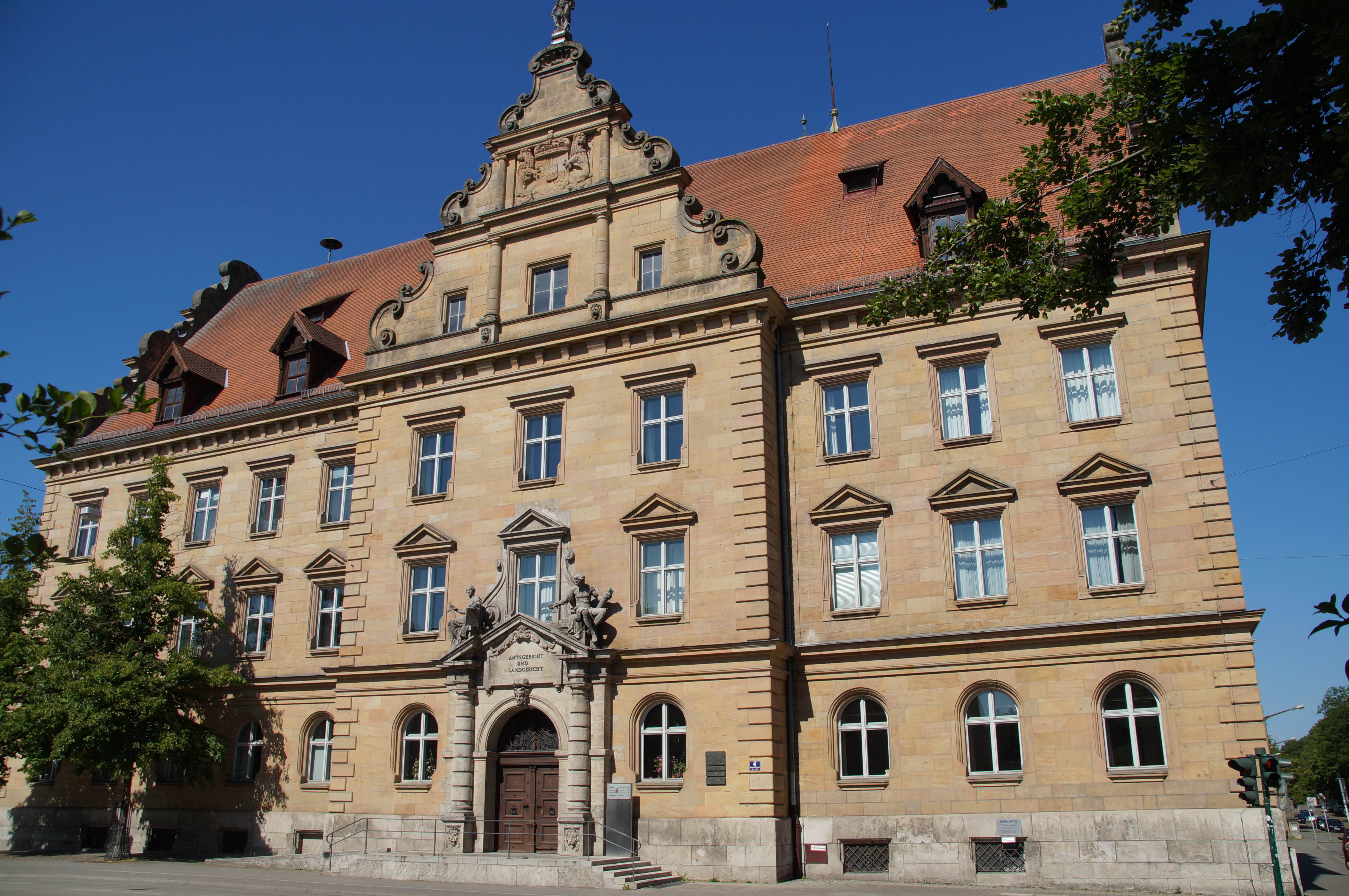 Justizgebäude, dreiflügeliger und dreigeschossiger Komplex mit Quertrakt, Mittelturm, Satteldächern, Risaliten, Schweifgiebeln und Portalen, Fassadengliederungen in Werkstein, Neurenaissance, 1905 von Friedrich Niedermayer; Brunnen, achteckiges Becken mit Balusterstock und Löwe, Neurenaissance, um 1905; Ehemaliges Pförtnerhaus, zweigeschossiger und traufständiger Satteldachbau mit Treppengiebeln und Eckerker, Neurenaissance, um 1905 wohl von Friedrich Niedermayer; Hofmauer mit Fußgängerpforte und Einfahrt, Sandquadermauer mit Löwenaufsatz, um 1905